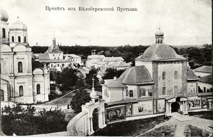 Белобережская пустынь. Общий вид и Святые врата (со старинной открытки)